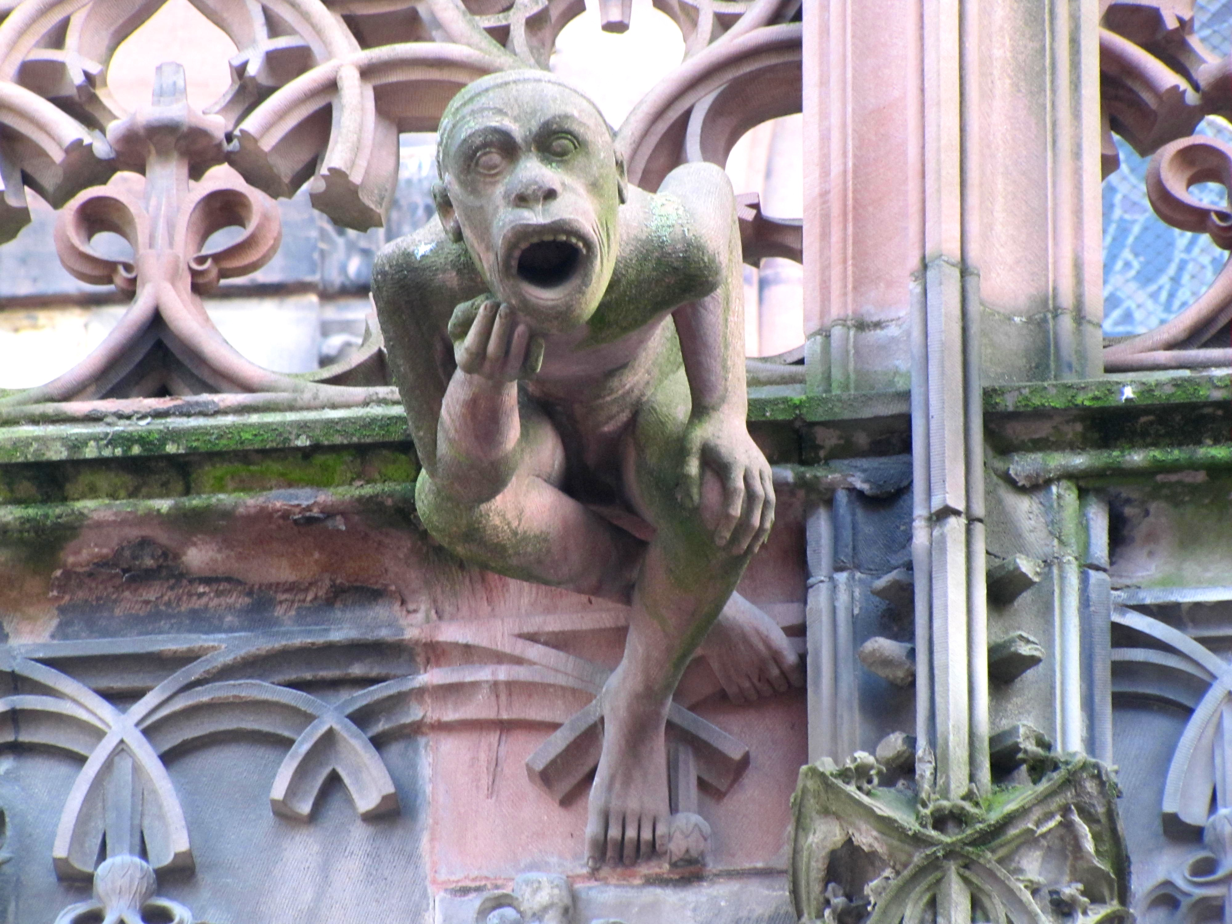 Alsace, Bas-Rhin, Cathédrale Notre-Dame de Strasbourg (PA00085015). Façade nord, Portail Saint-Laurent: gargouille